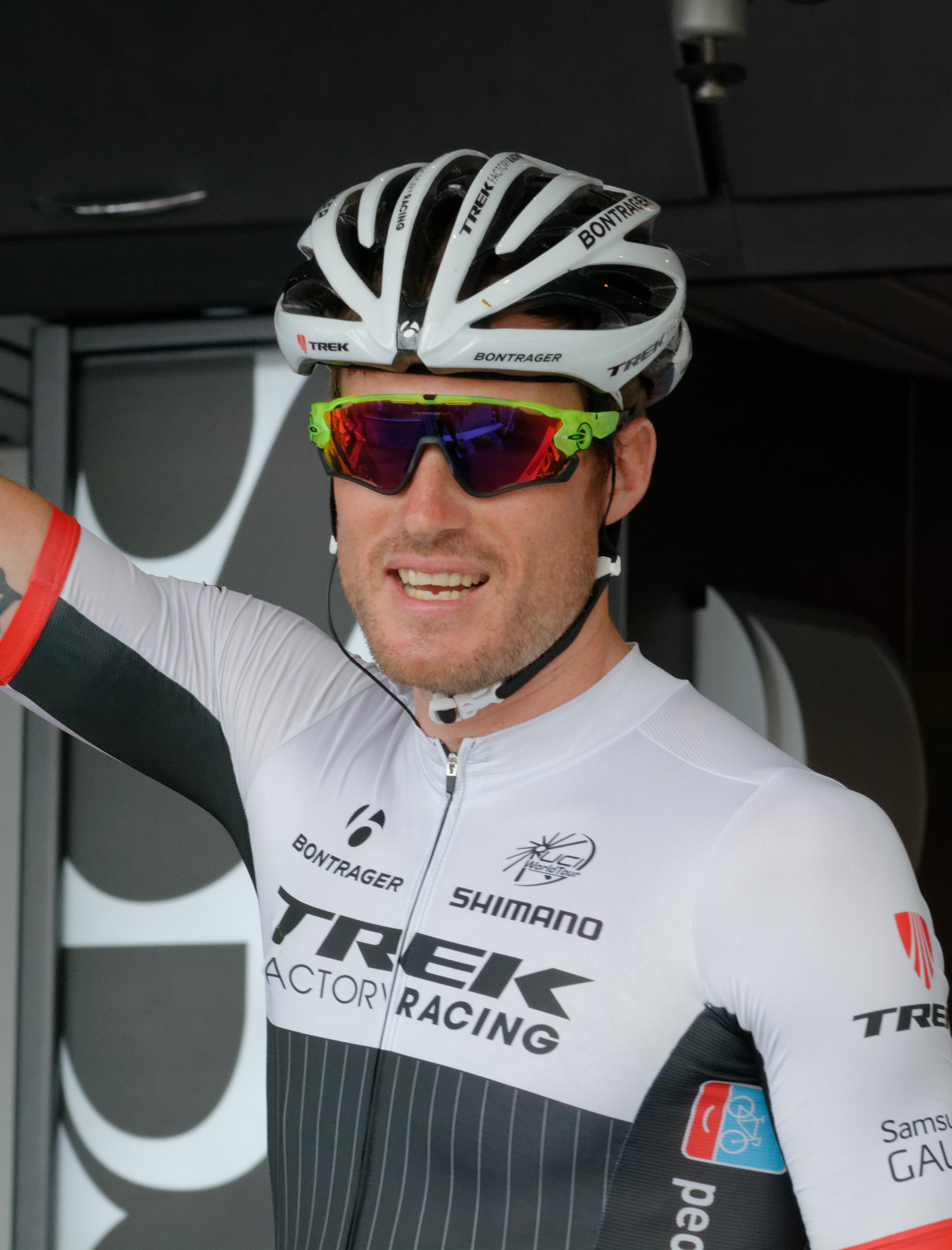 D71_9903_DxO